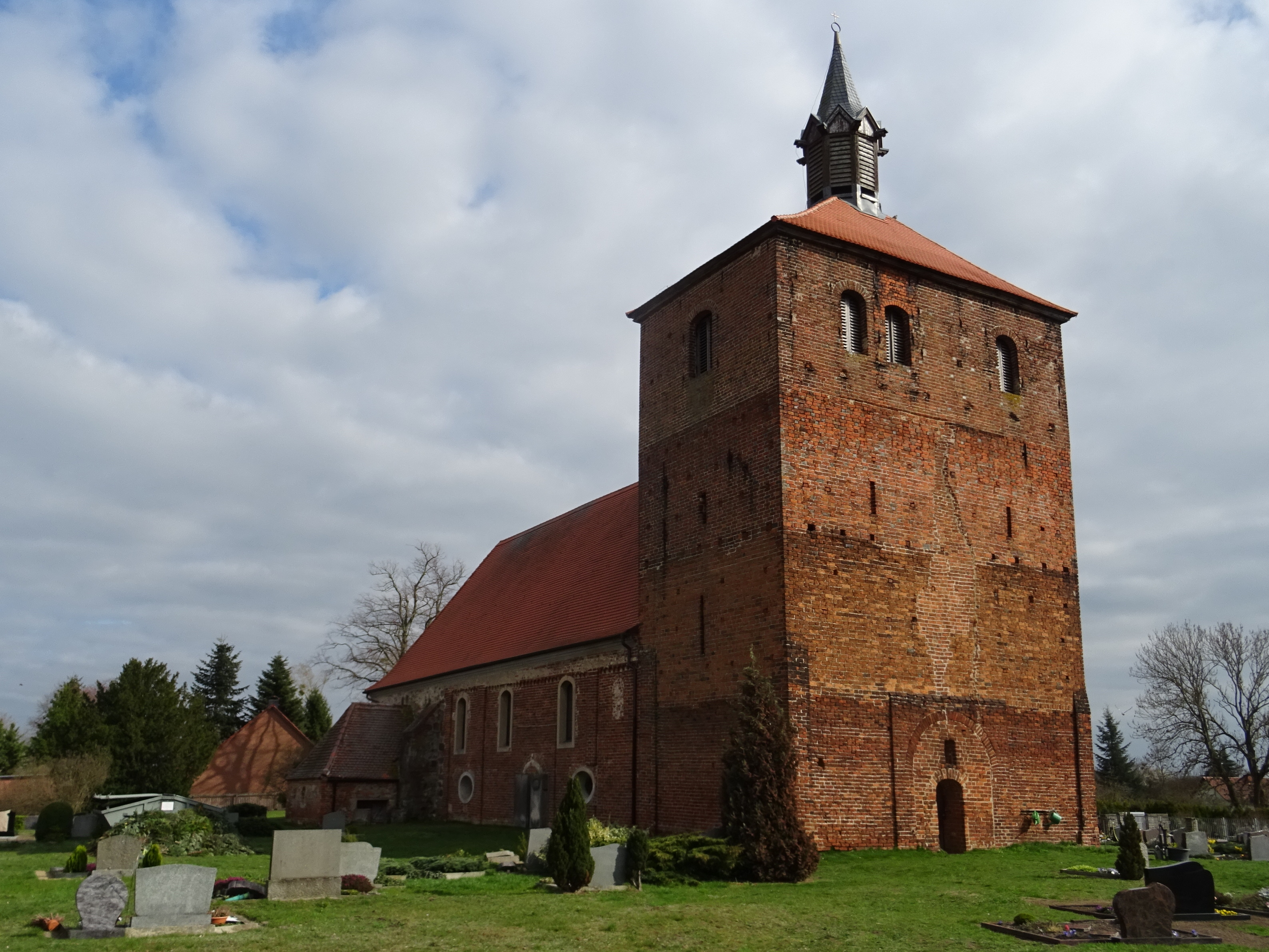 Schönberg, Stadt Seehausen (Altmark), Dorfkirche von Nordwesten